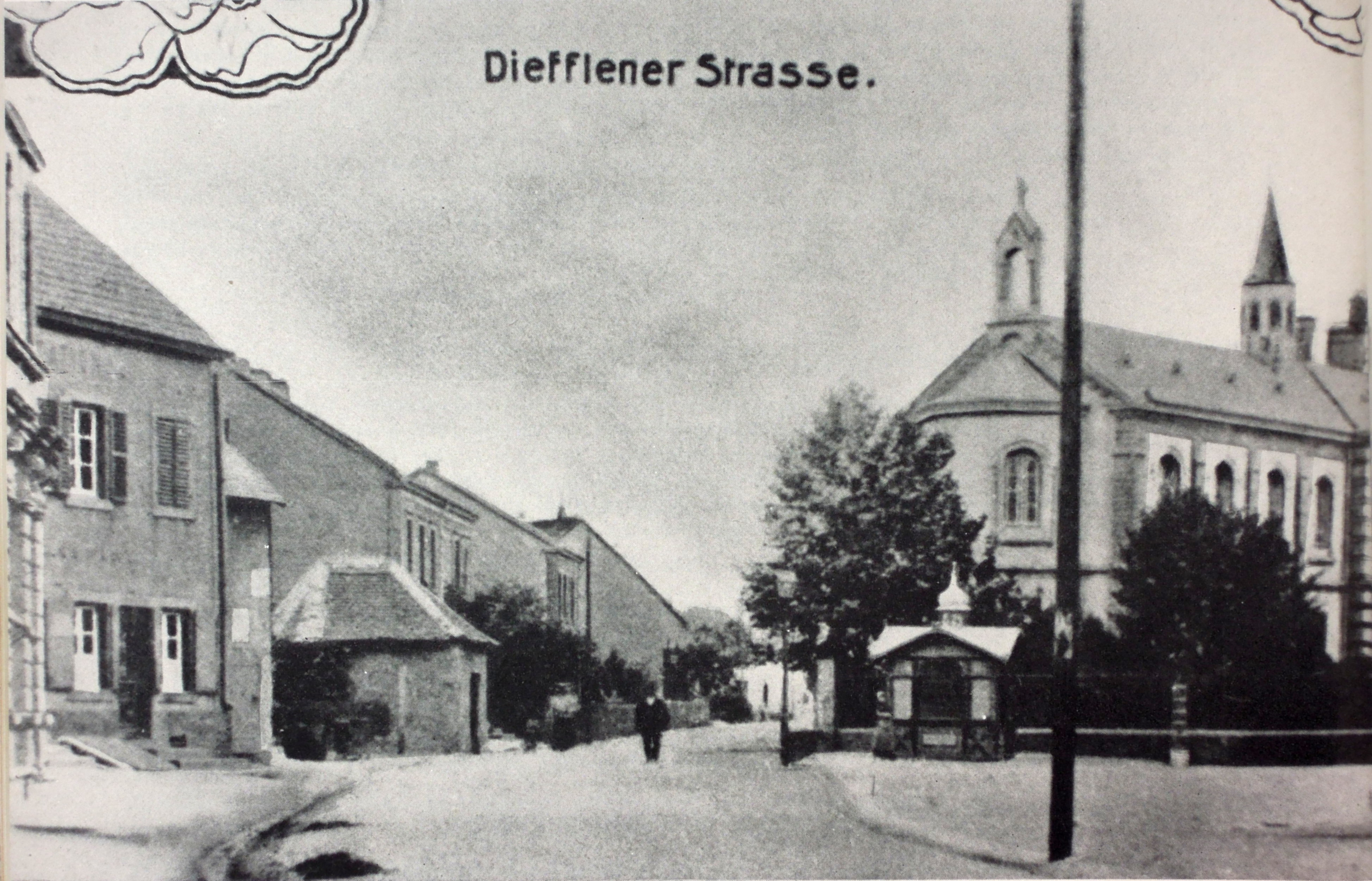 links: Odilienkapelle Ecke Trierer-, Dieffler-Straße, rechts:Altes Krankenhaus